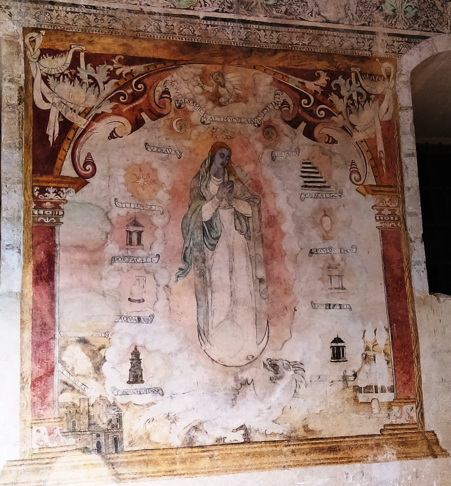 Templo y exconvento de los Santos Reyes, Metztitlán.